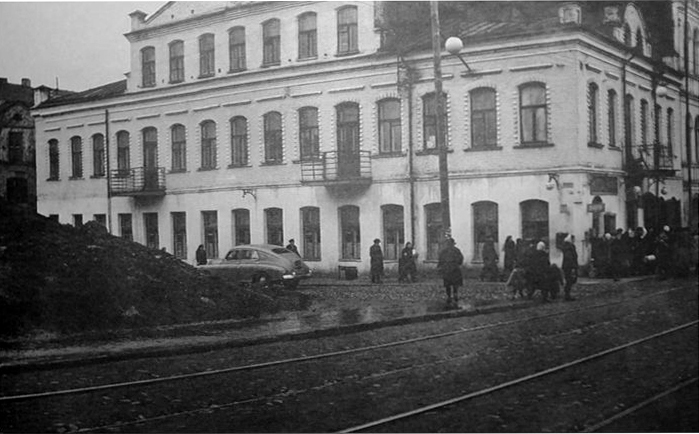 Мінск. Камсамольская 17 (XX)